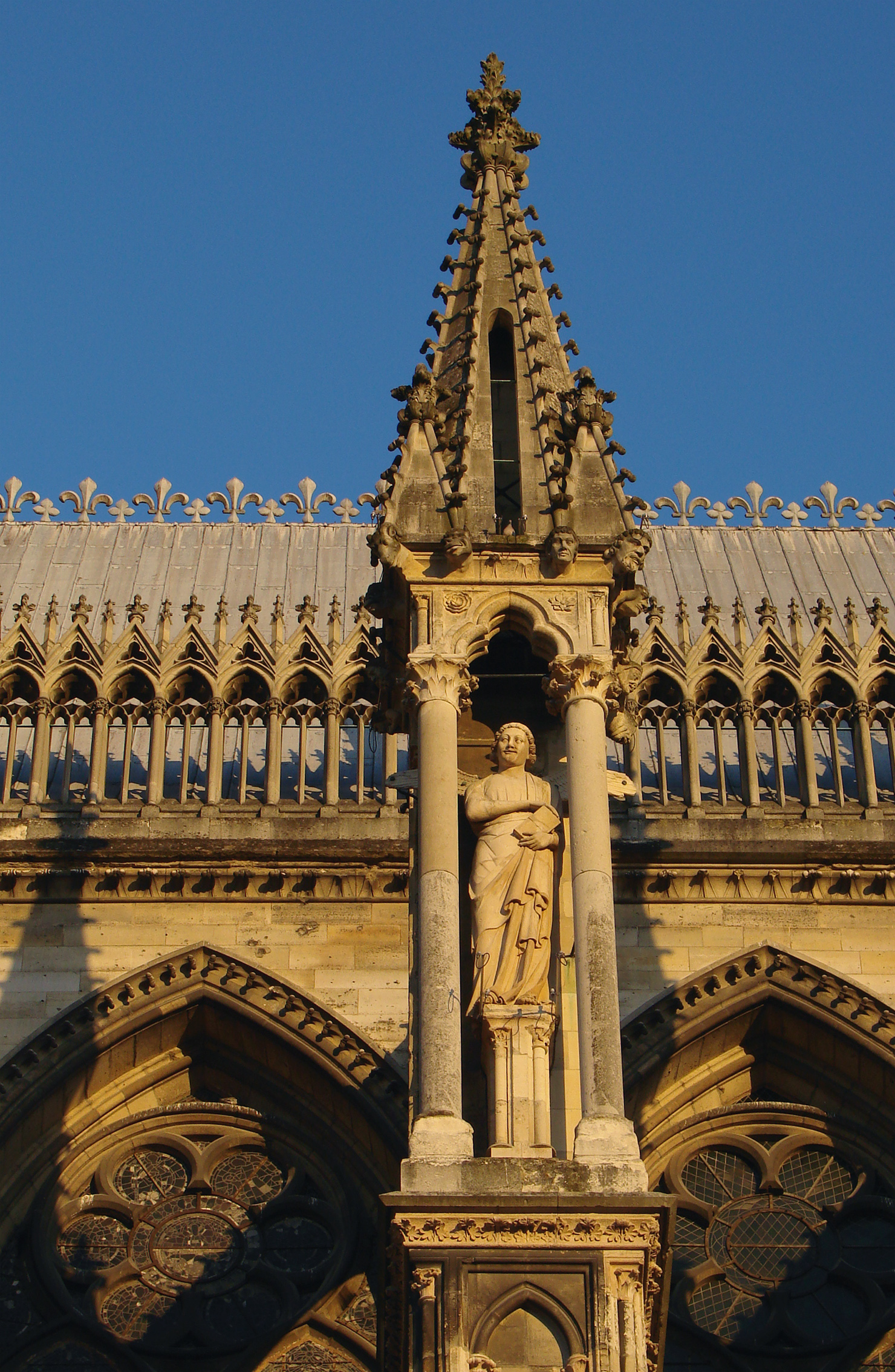 Vue de la nef côté Nord: un ange dans son pinacle. Cathédrale de Reims.